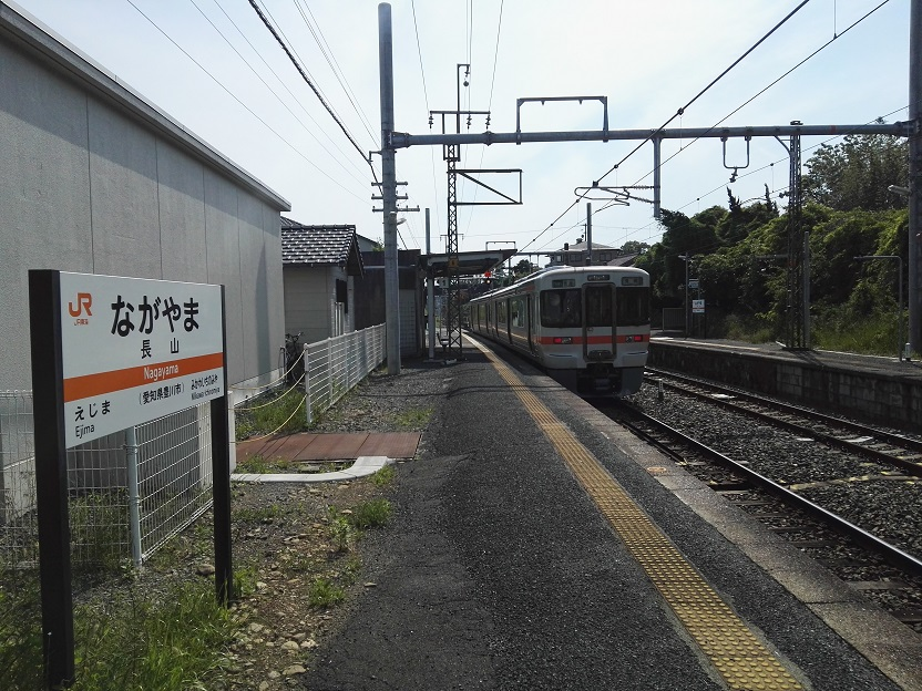 Nagayama station platform